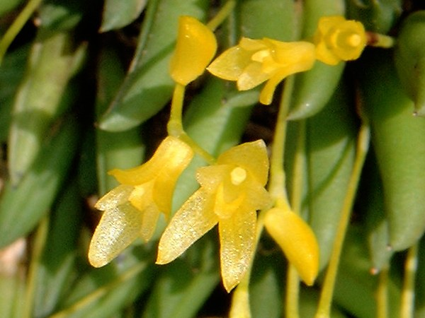 Photos taken by Dalton Holland Baptista & Americo Docha Neto for Orchidstudium